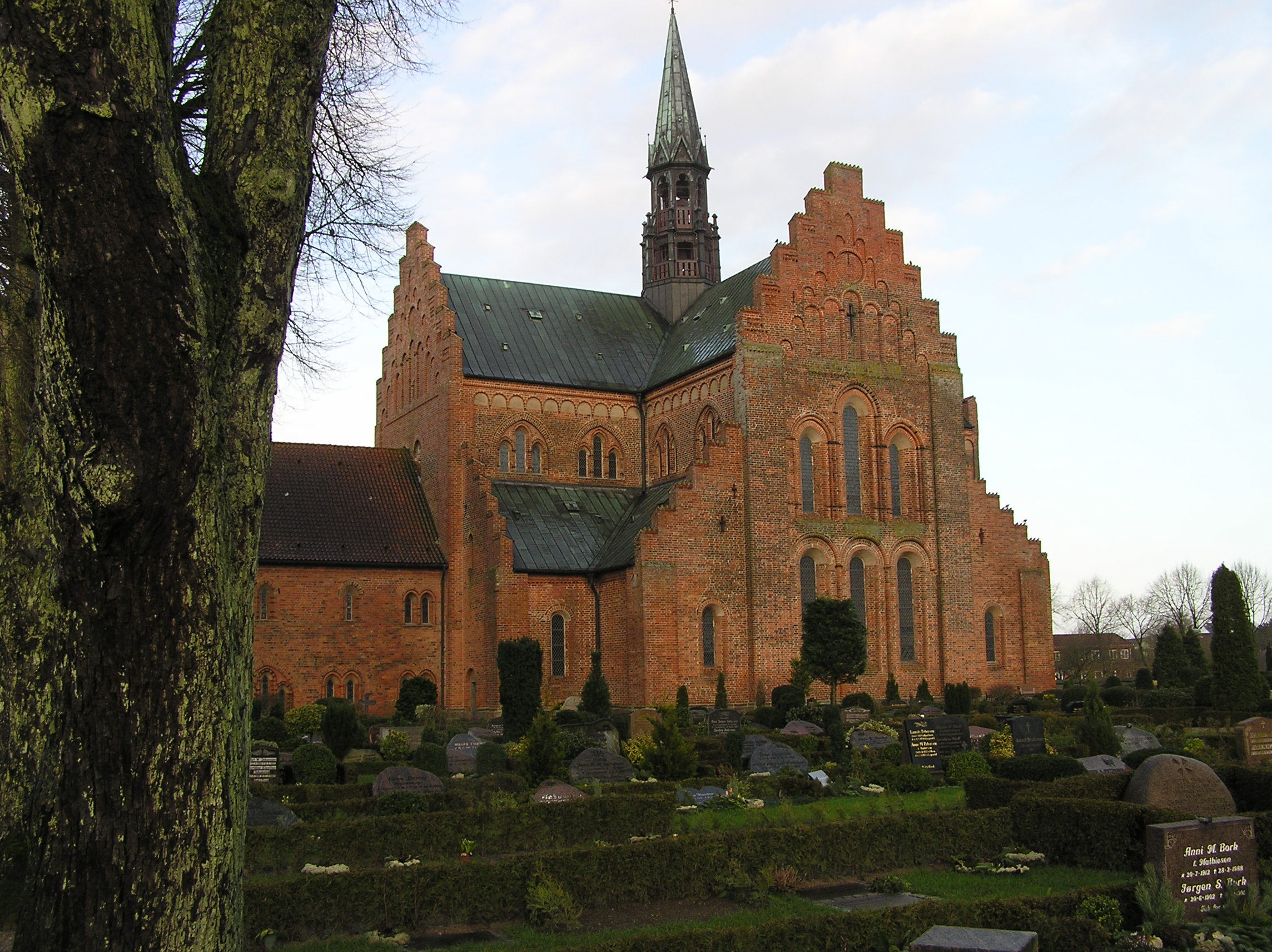 Løgumkloster Kirke